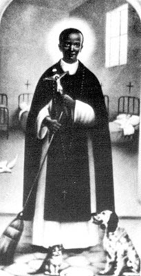 Pintura anonima de San Martín de Porres.